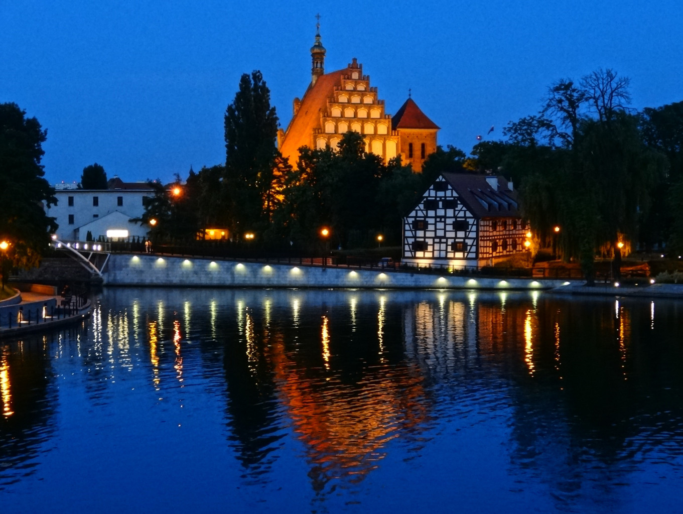 Katedra p.w. św. Marcina i Mikołaja w Bydgoszczy (XV w.) oraz Biały Spichlerz (XVIII w.) - widok z grobli na Wyspie Młyńskiej